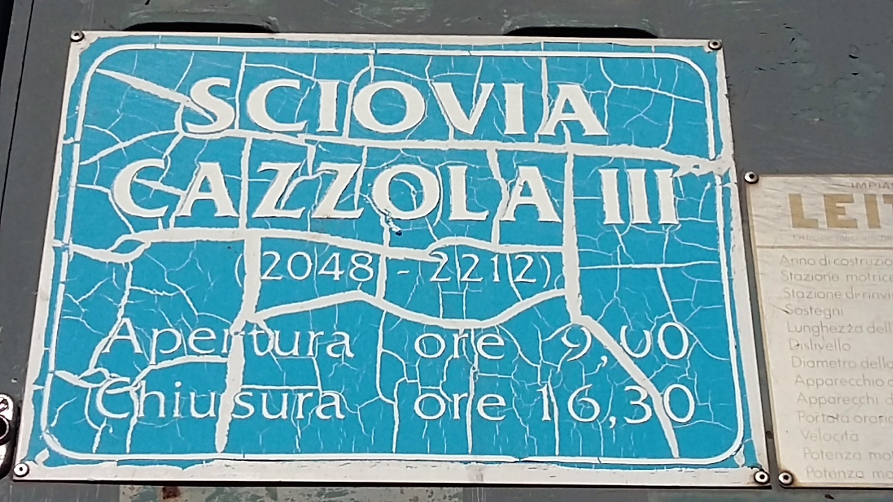 Plakette am Schlepplift des Monte Cazzola Skigebiets